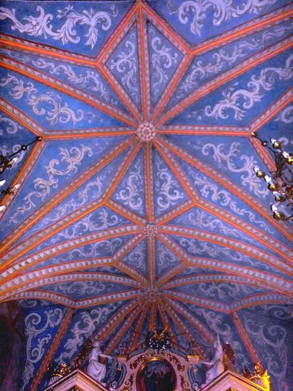 Sklepienie gwiaździste nad prezbiterium w kościele św. Wojciecha w Brdowie (woj. wielkopolskie)